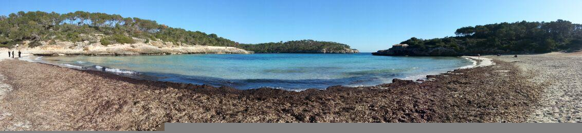 Cala Mondragó, Mallorca (Spain)